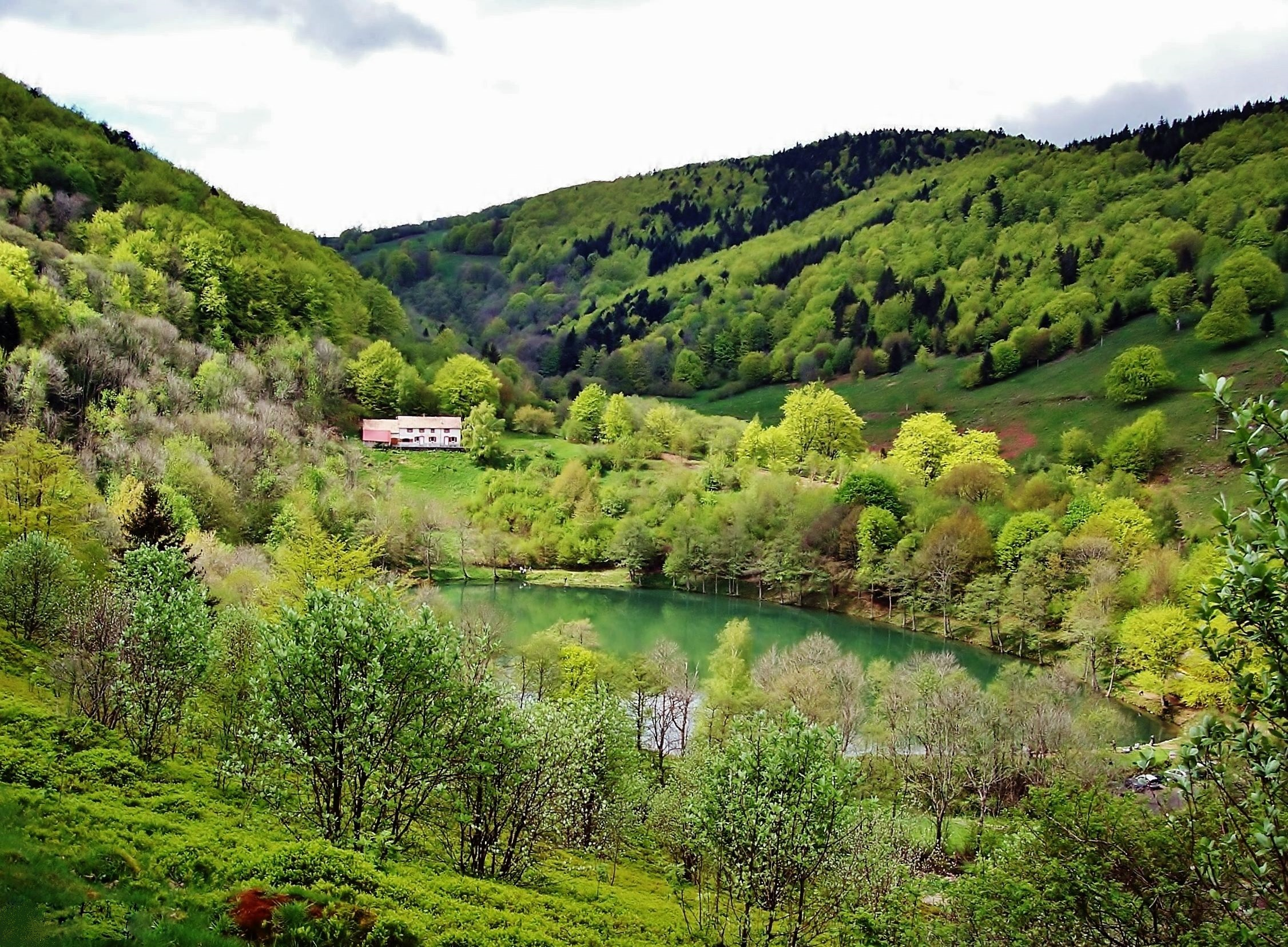 Lachtelweiher.